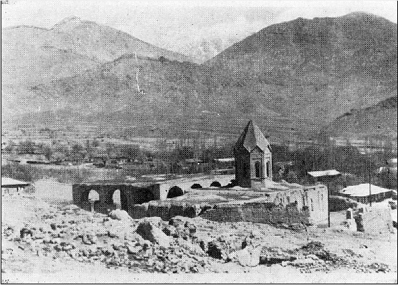 Ագուլիսի սբ.Երրորդություն եկեղեցի Holy Trinity Church, Agulis